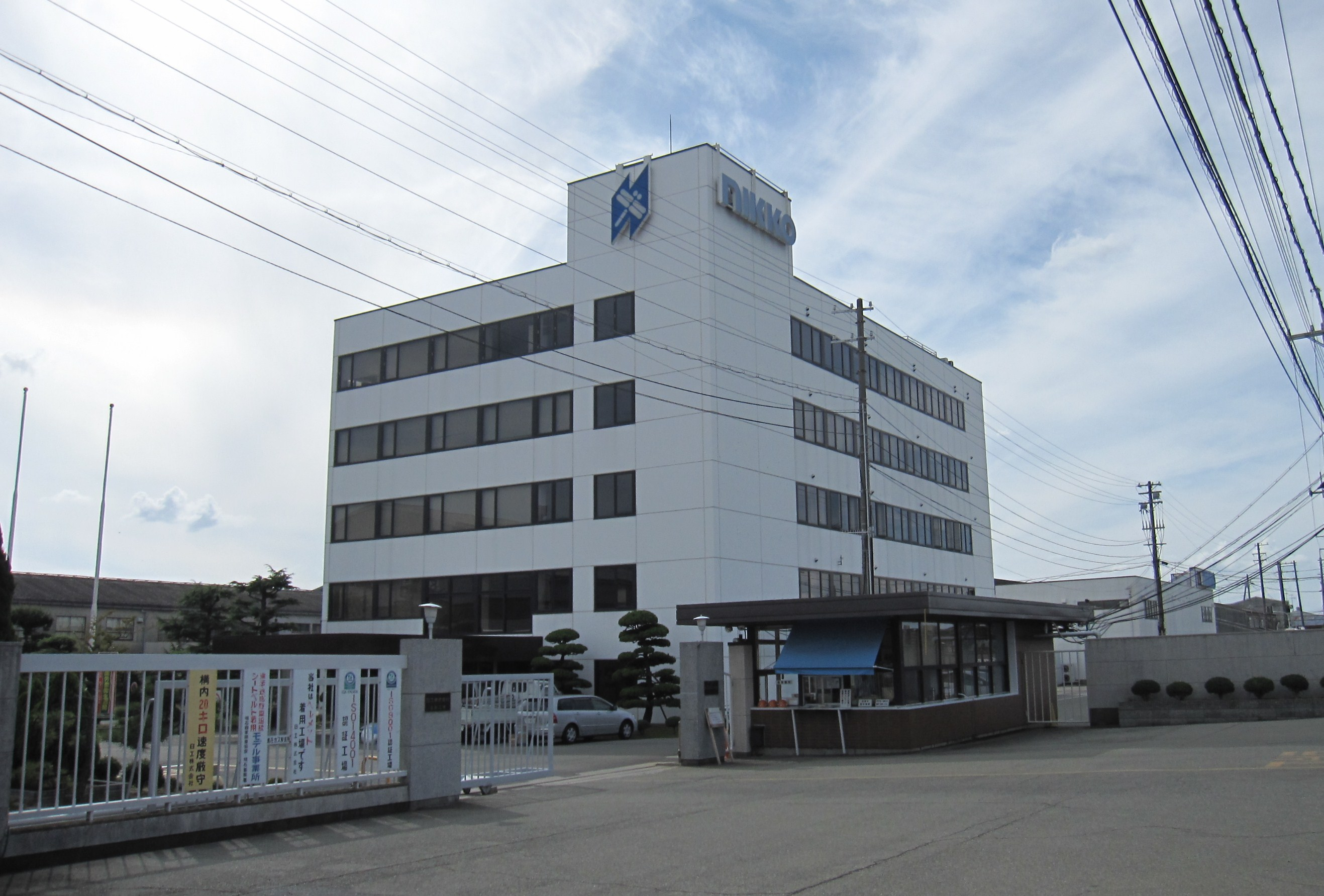 日工本社工場